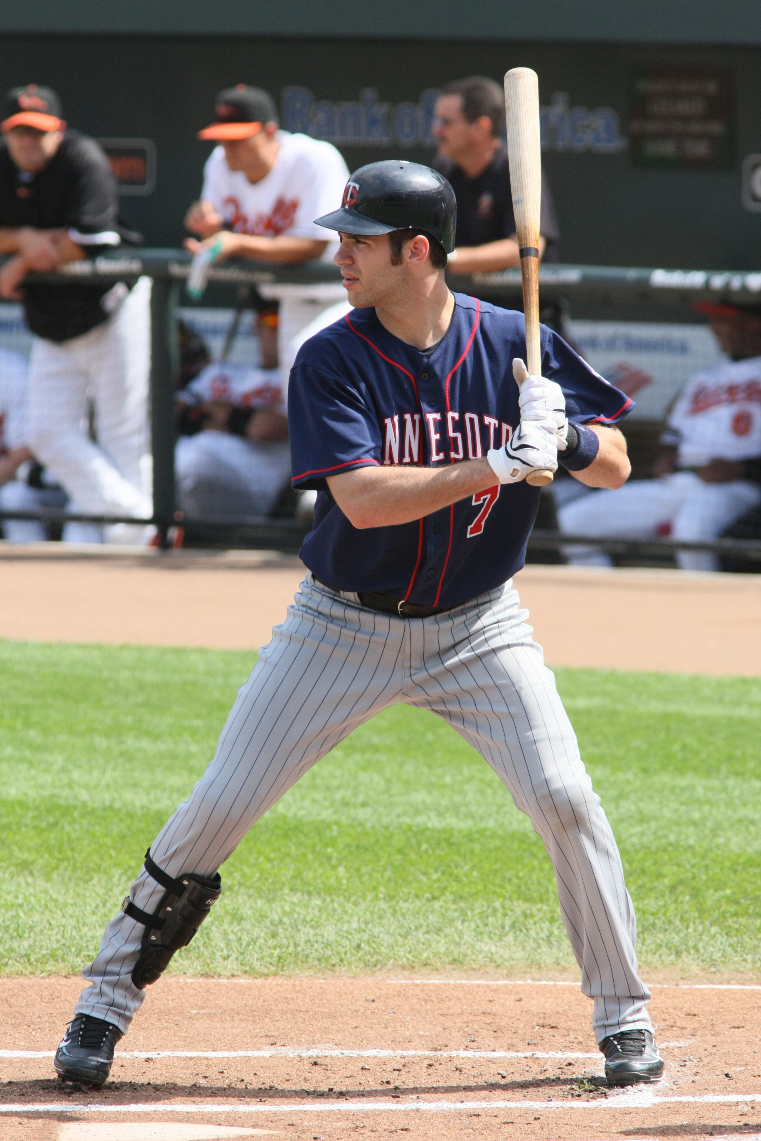 Joe Mauer